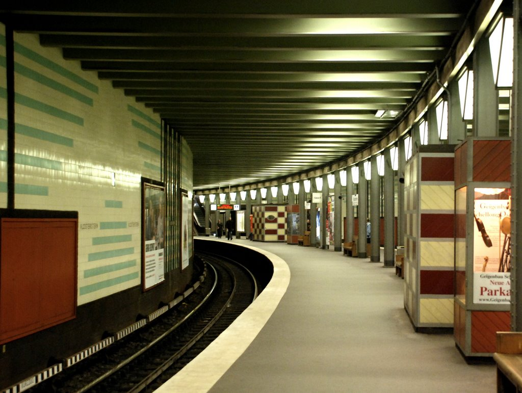 U-Bahn-Station Klosterstern